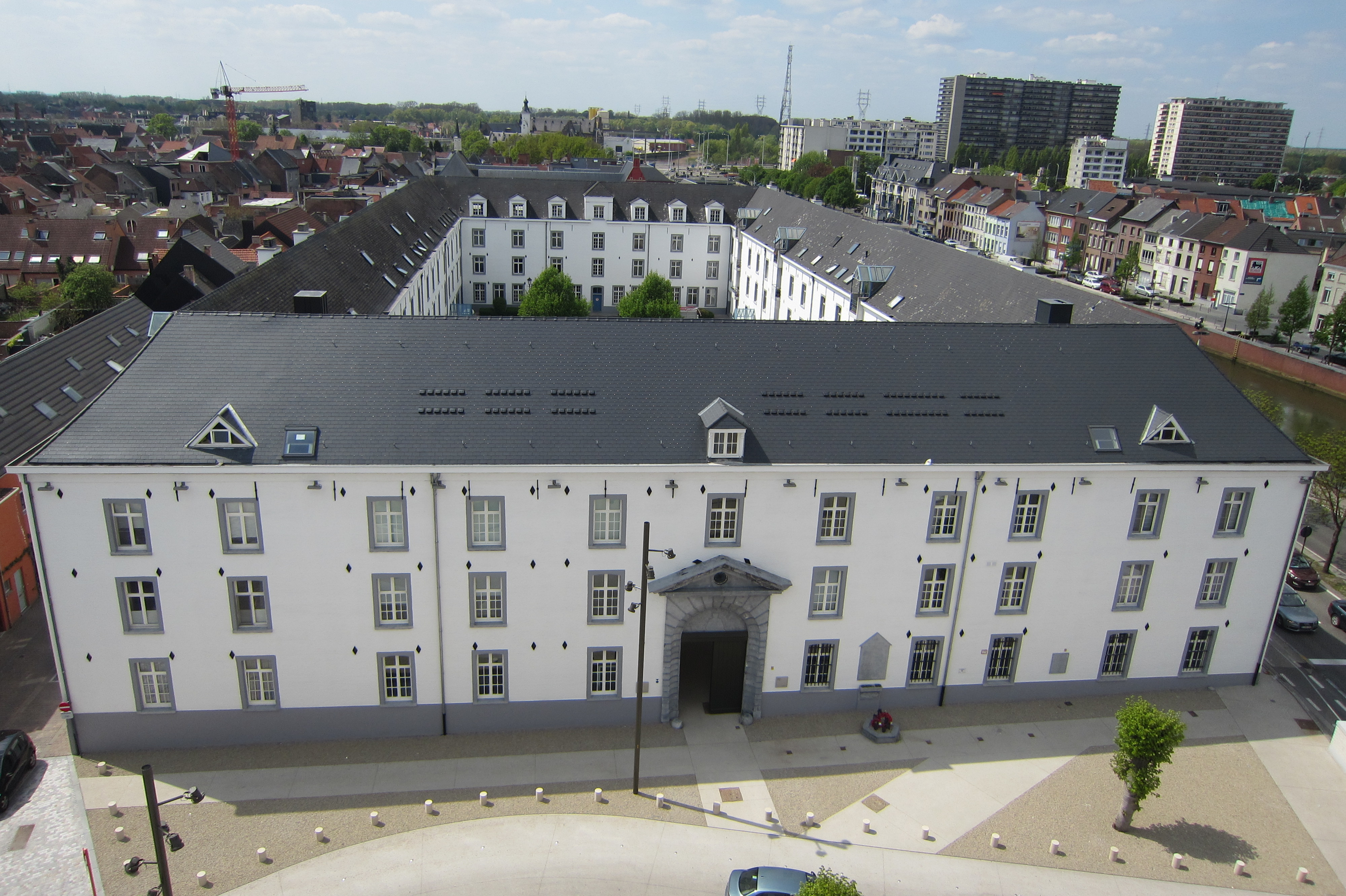 Dossin Kazerne, Mechelen gezien vanaf het nieuwe museum